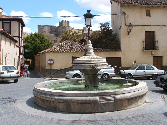 Fuente y Castillo Berlanga Duero (Soria)